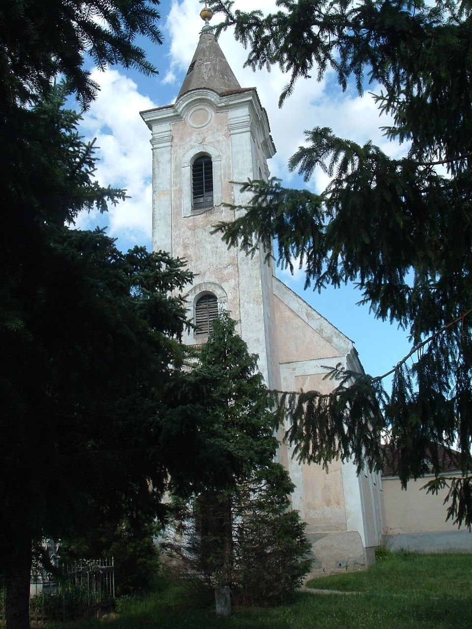 The Church in Szentléránt (Sorkifalud), Hungary. Szent Lénárd apát római katolikus templom